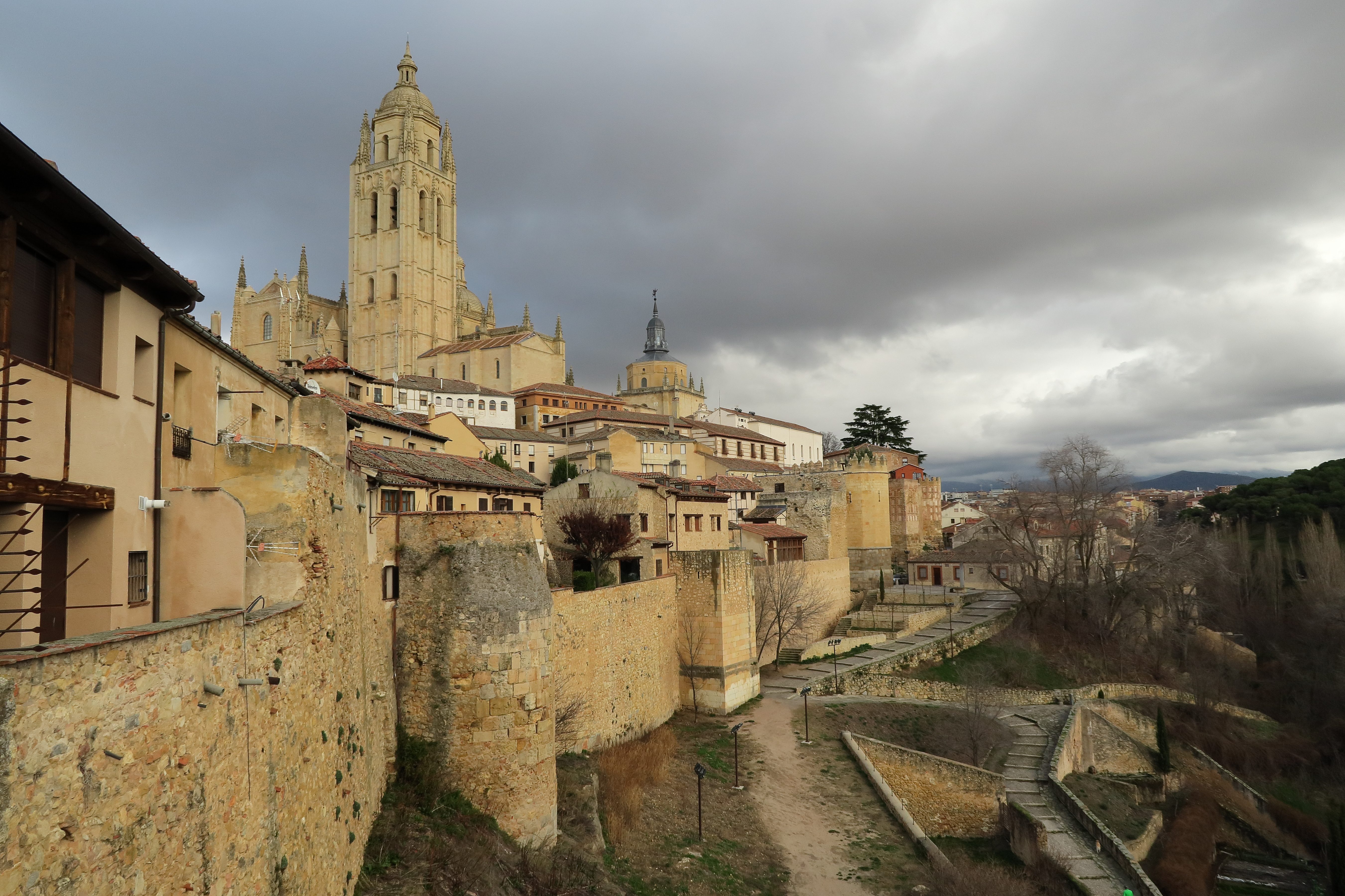 Catedral de Segovia, muralla suroeste y Cuesta de los Hoyos, desde el Museo de Segovia